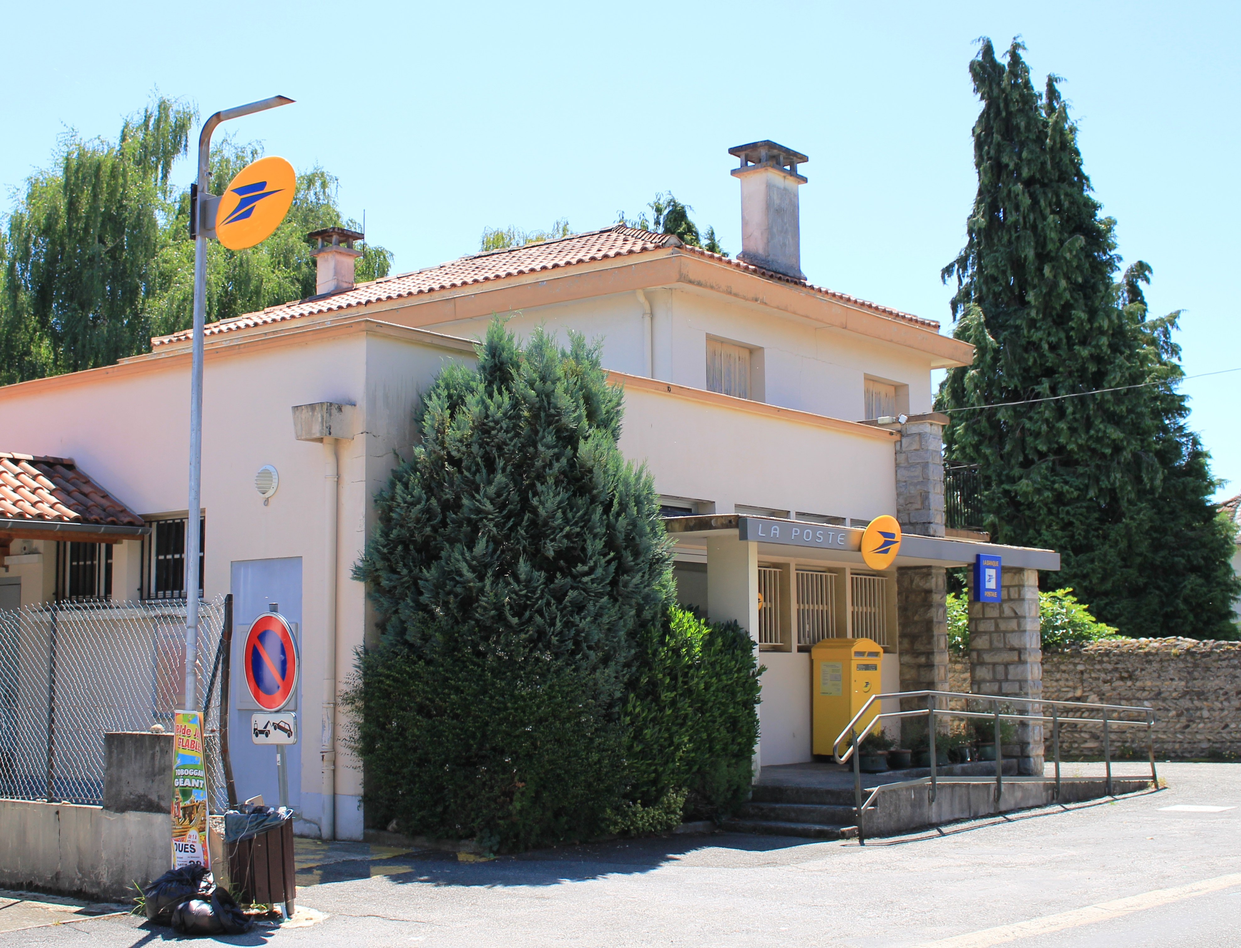 Poste de Soues (Hautes-Pyrénées)